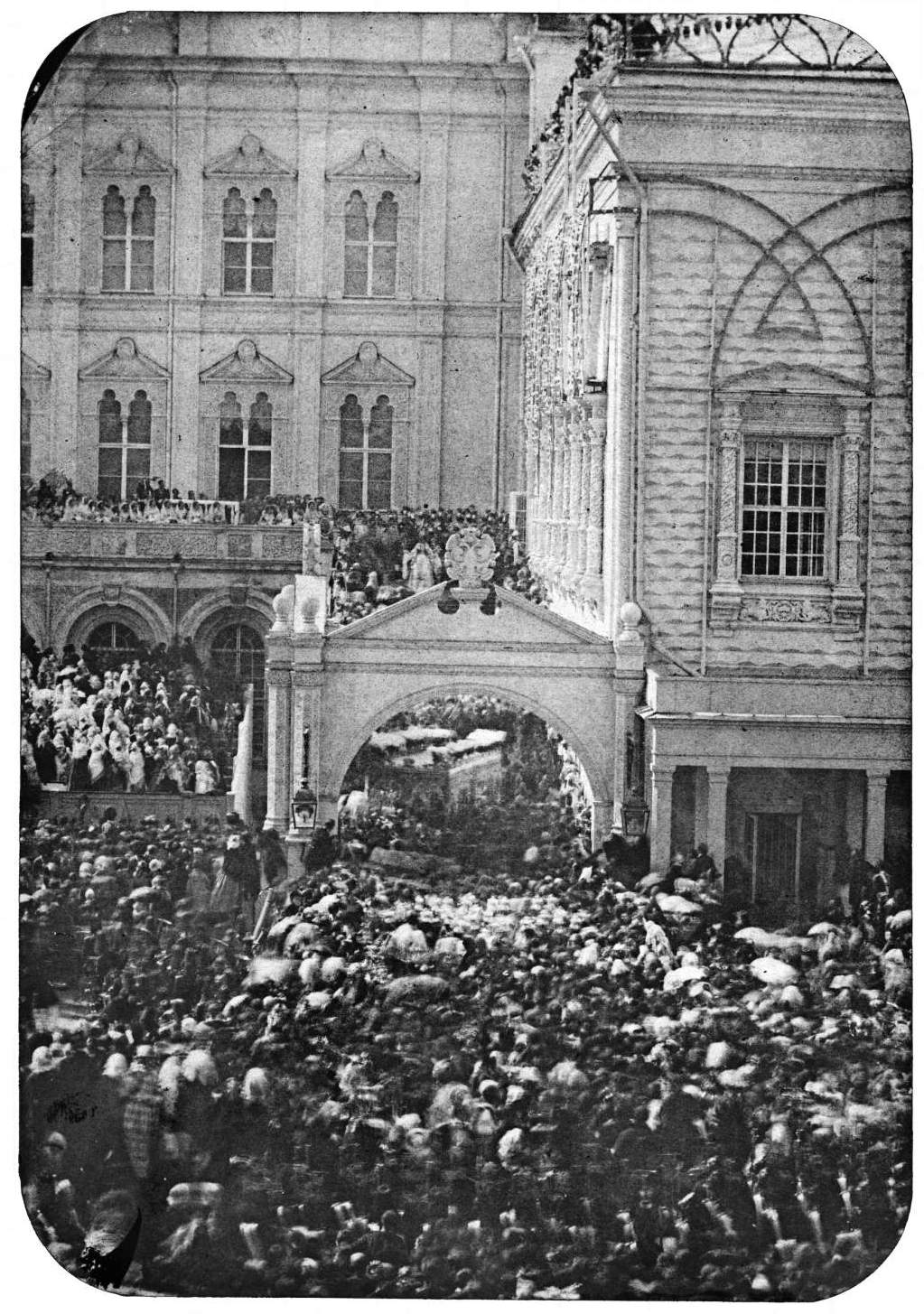 Коронация Александра II